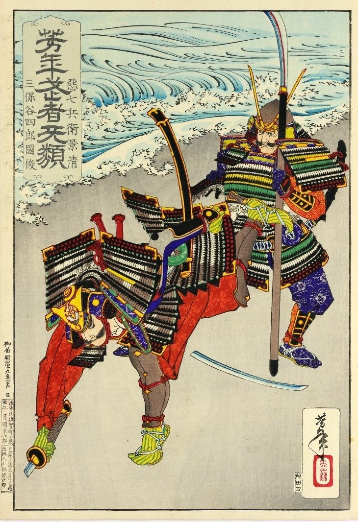 悪七兵衛景清 三保谷四郎国俊 月岡芳年画「芳年武者无類」。源平合戦の屋島の戦い（1185年）での「しころ引き」の場面を描いたもの。「しころ」は、首を守るために兜の後ろに垂れ下がっている部分を指す。太刀を折られて逃げる三保谷四郎国俊（美尾屋十郎）のしころを悪七兵衛景清（平景清）が引きちぎった